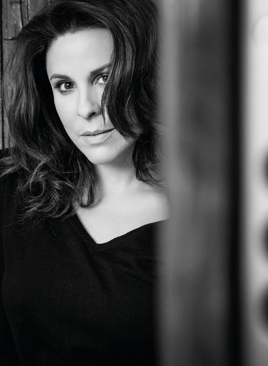 Malena Gonzalez - Sesión de fotos 2018